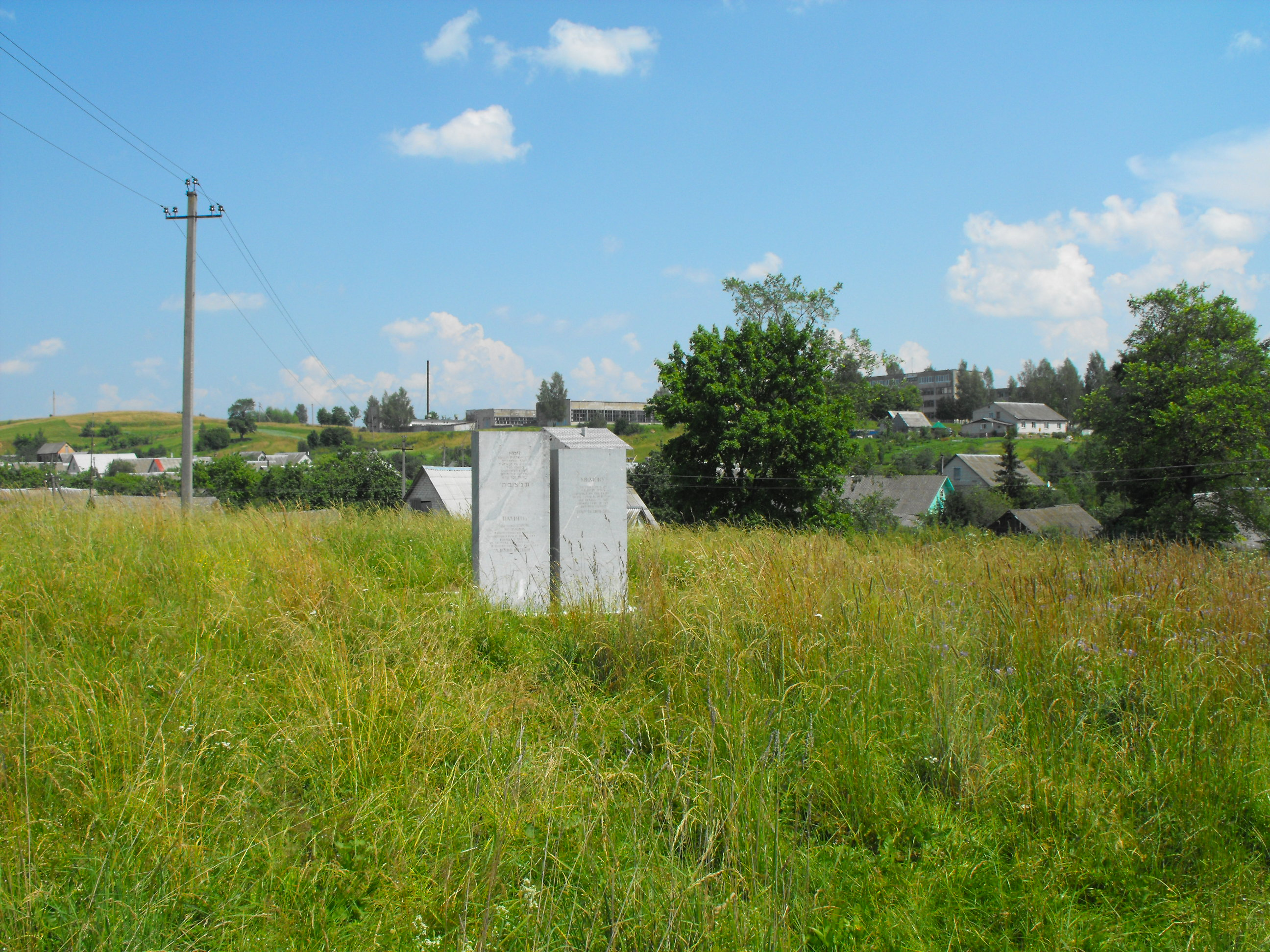 Памятник на еврейском кладбище Воложина евреям - узникам Воложинского гетто, убитым в 1941-1943 годах и похороненным на этом кладбище в нескольких братских могилах